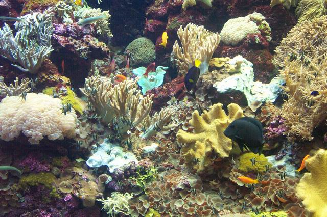 Anthozoa